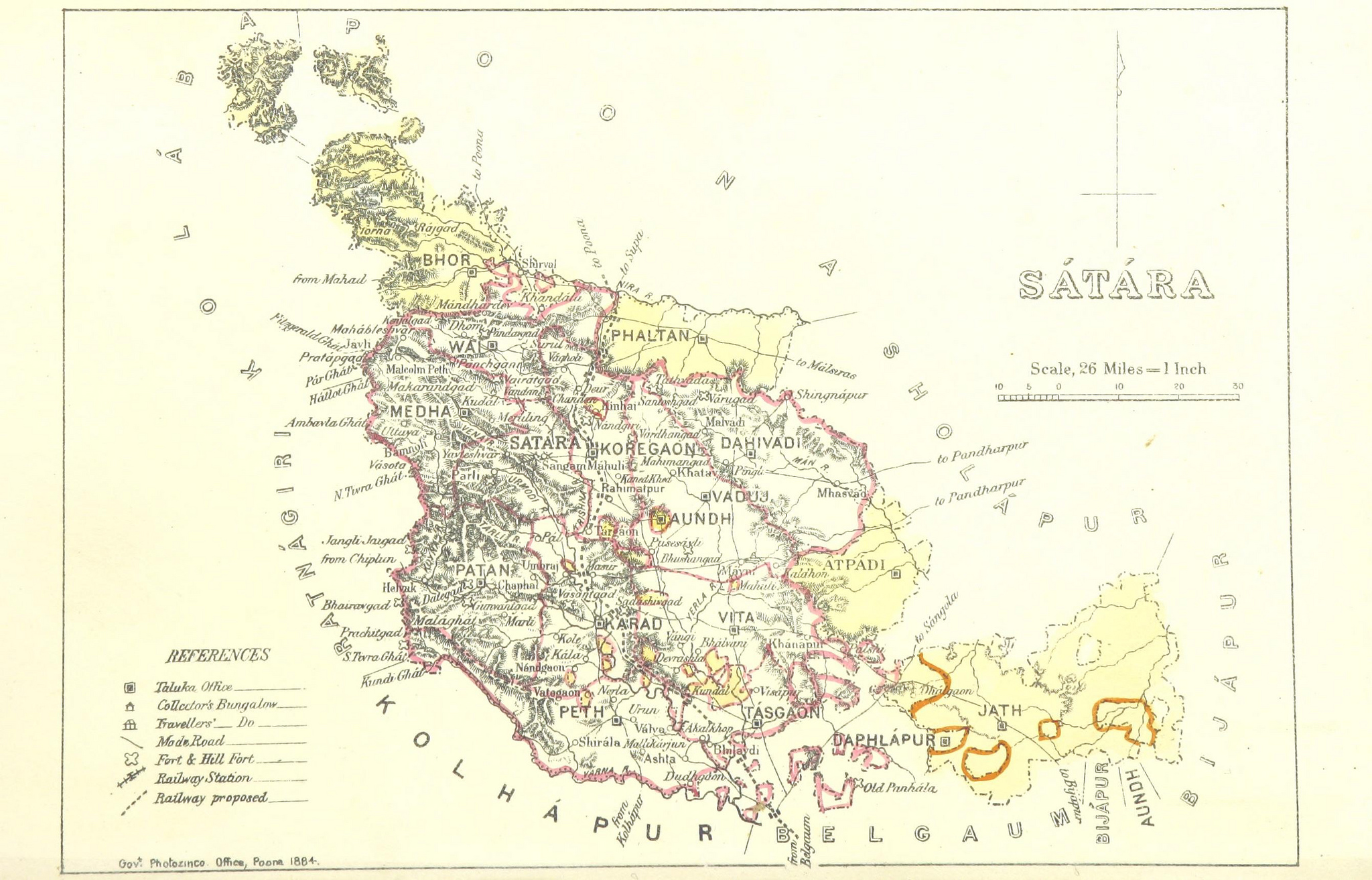 Satara 1896